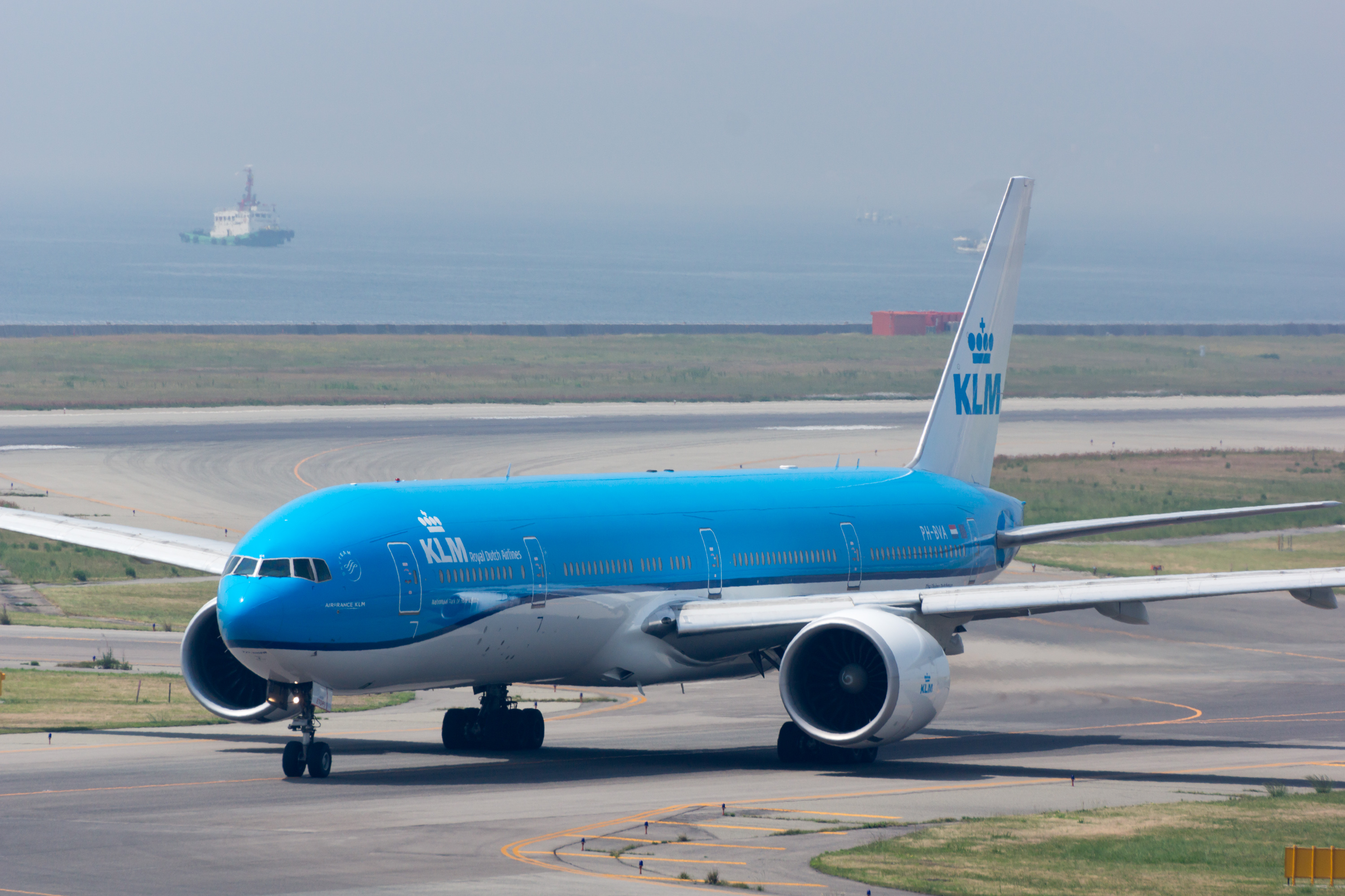 KLM Royal Dutch Airlines/ Koninklijke Luchtvaart Maatschappij/ KLMオランダ航空 Boeing 777-306/ER PH-BVA KL868,Departed to Amsterdam Osaka Kansai Int'l Airport